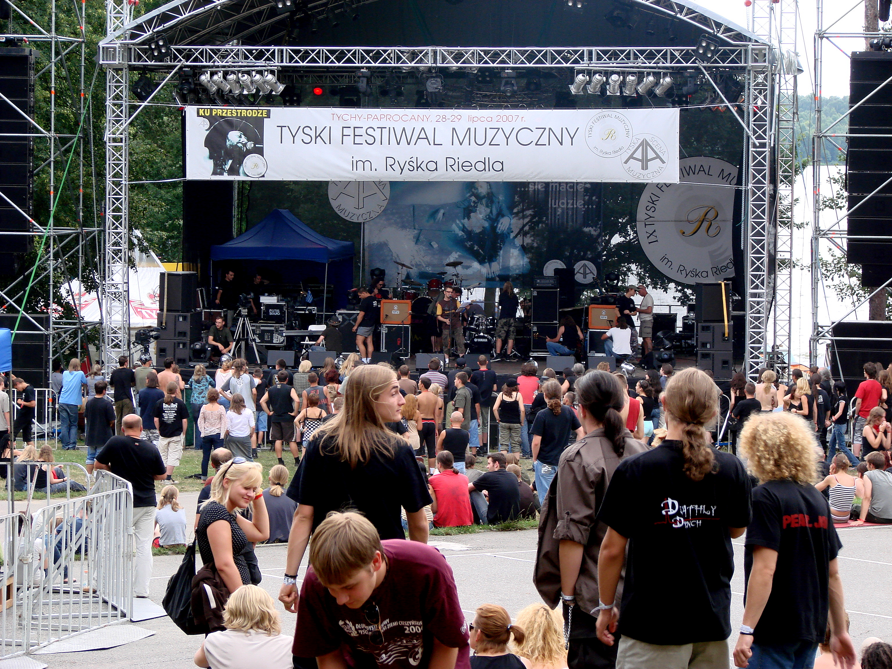 Scena muzyczna na Festiwalu Ryśka "Ku Przestrodze"